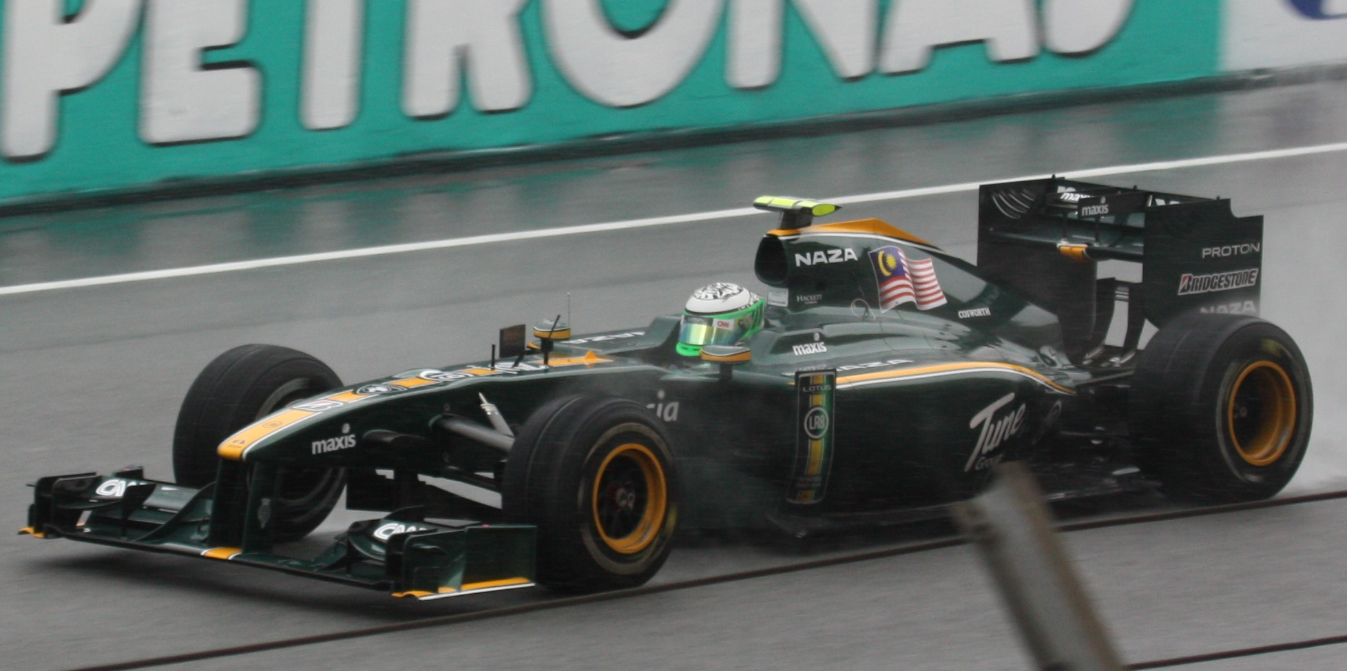 Kovy Malaysian qualy